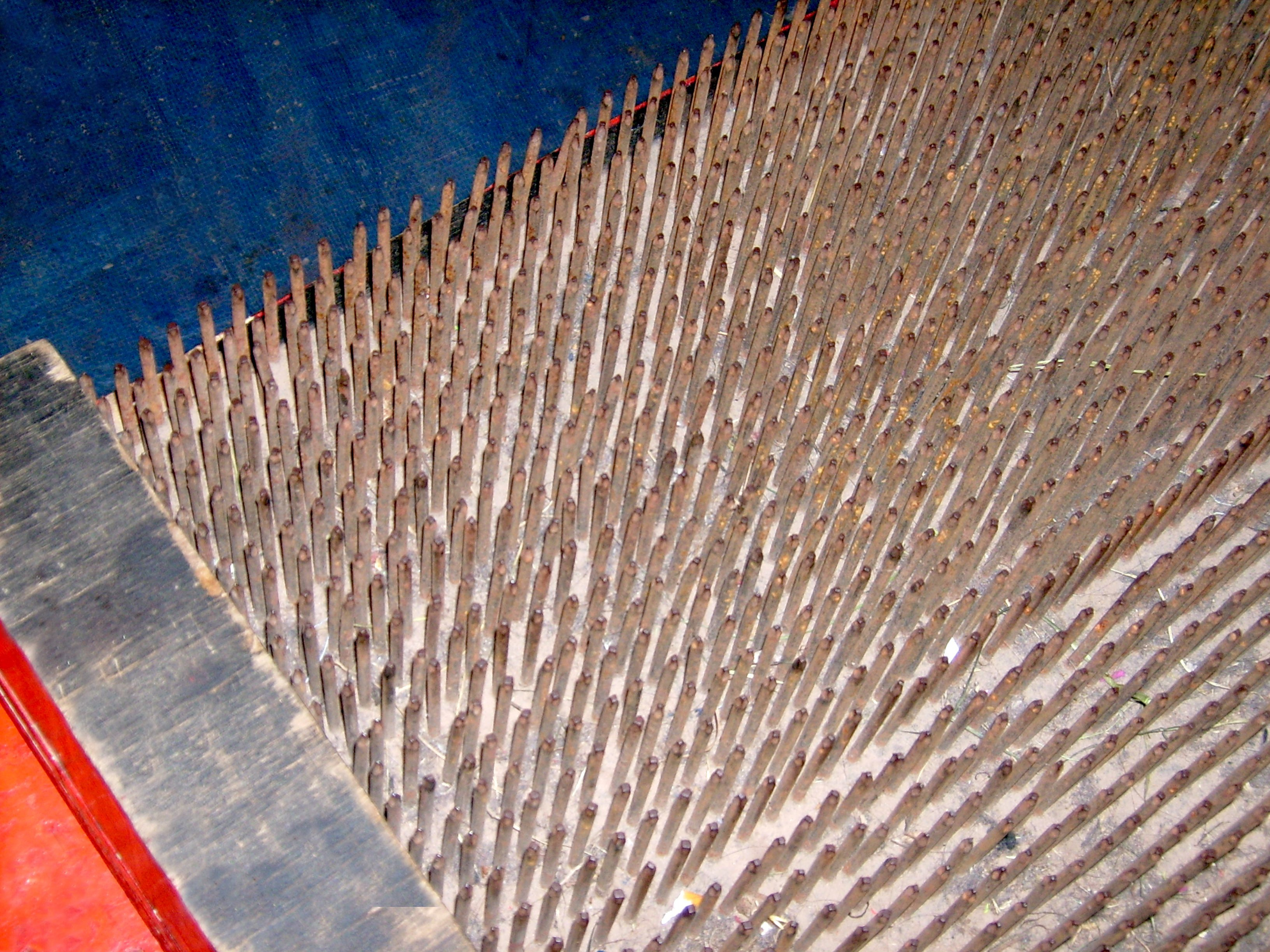 Nagelbrett Ausschnitt